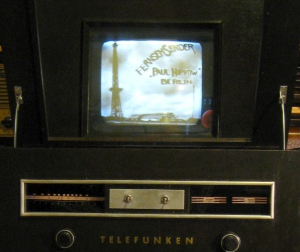 Deutscher Spiegelfernseher Telefunken FE VI von 1937. Pausenbild: FernsehSender "Paul Nipkow" Berlin" Der im Auflicht beige-bräunliche Leuchtstoff flouresziert bläulich-weiß.